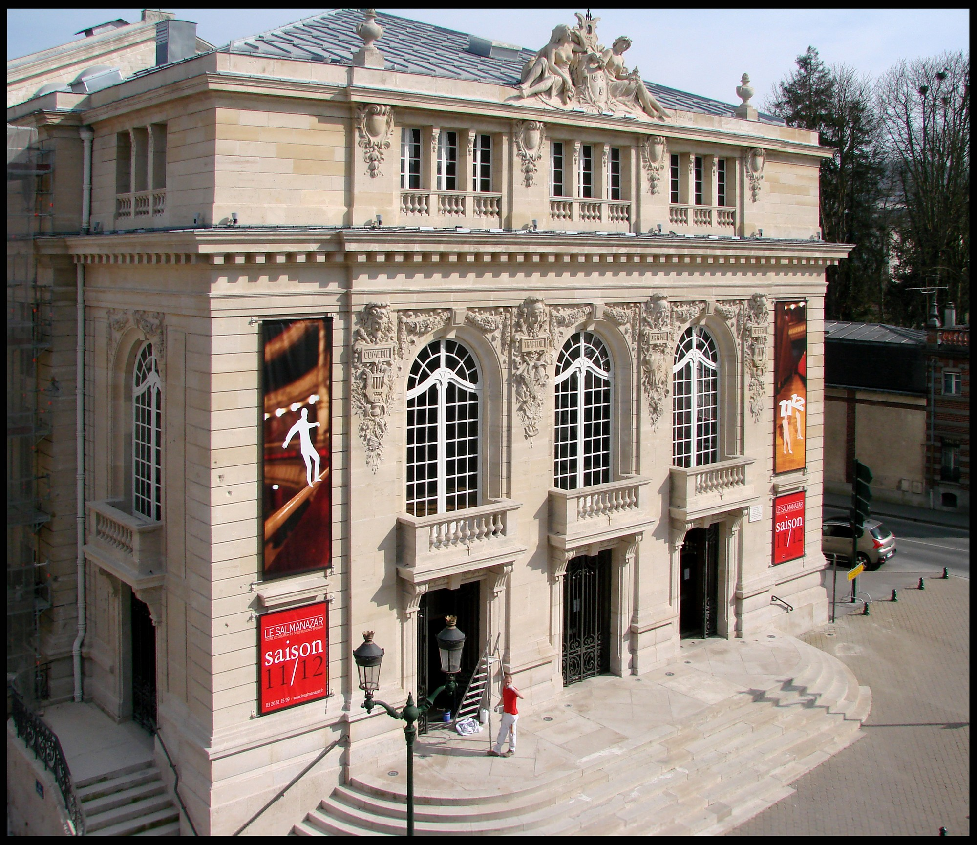 Le théâtre Gabrielle-Dorziat de style Louis XV et construit en 1898, est décoré par de très grands artistes. Il est baptisé du nom de la comédienne sparnacienne Gabrielle Dorziat et est inscrit au titre des monuments historiques. .